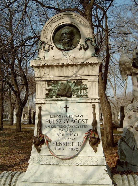 Pulszky Ágost (Bécs, 1846. júl. 3. – Bp., 1901. szept. 11.): jogfilozófus és szociológus, egyetemi tanár és leánya Henriette sírja Budapesten. Kerepesi temető: 29/3-1-16 [szobrász: Vögerl Alajos].